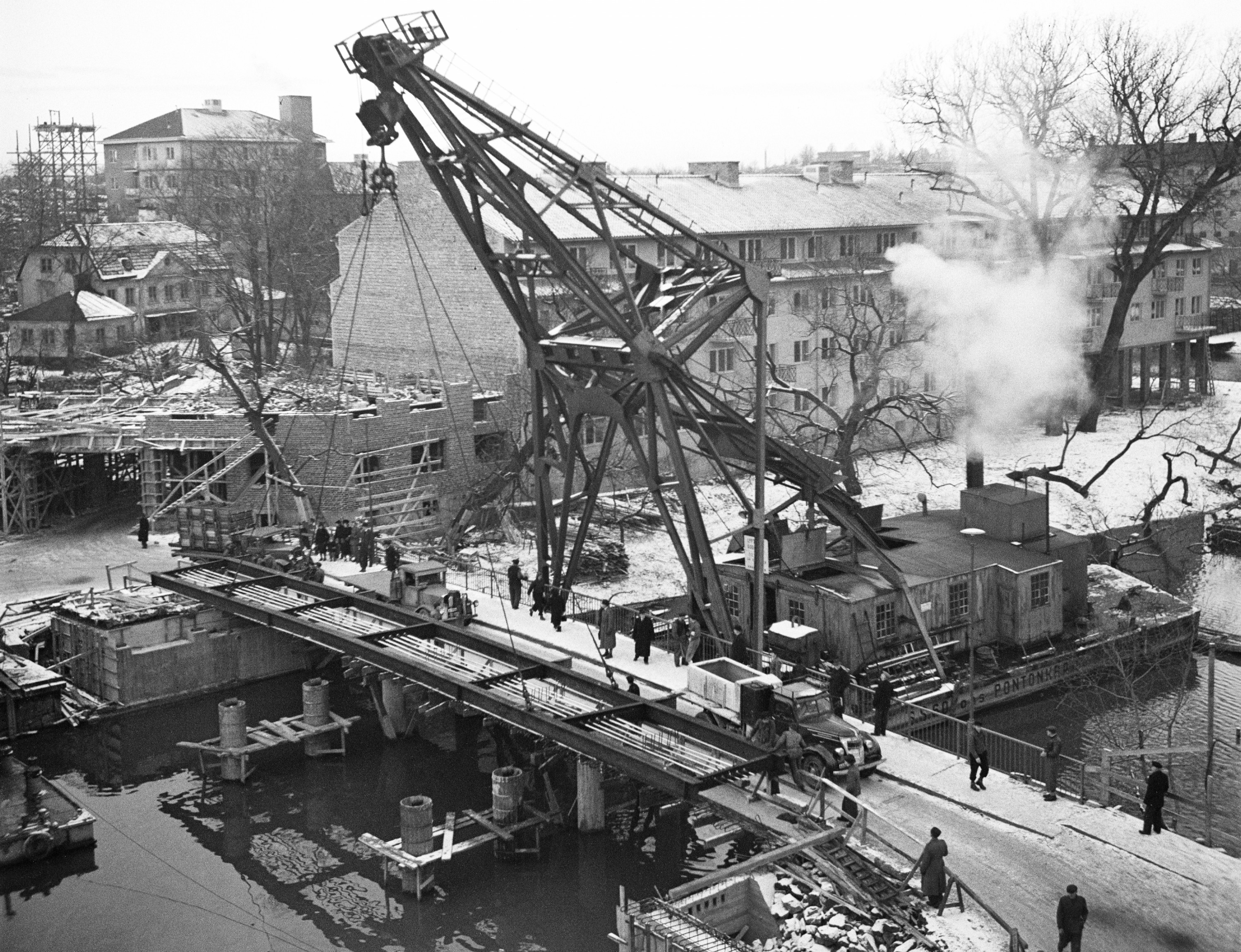 Reimersholme. Nya bron till Reimersholme, Reimersholmsbron. Betongbron över Bergsundet byggdes i två omgångar, här läggs den andra brohalvans järnkonstruktion på plats med hjälp av en pontonkran.